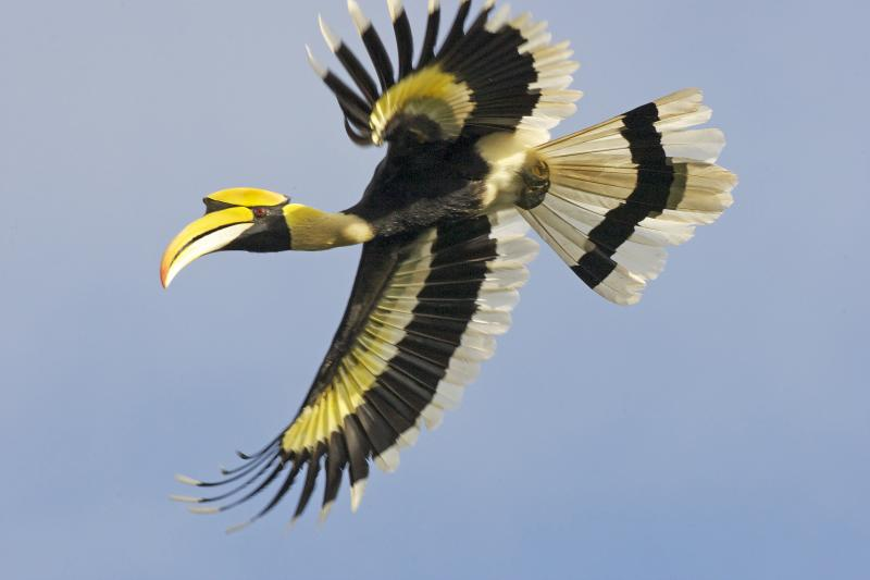 קלאו בכיר עף